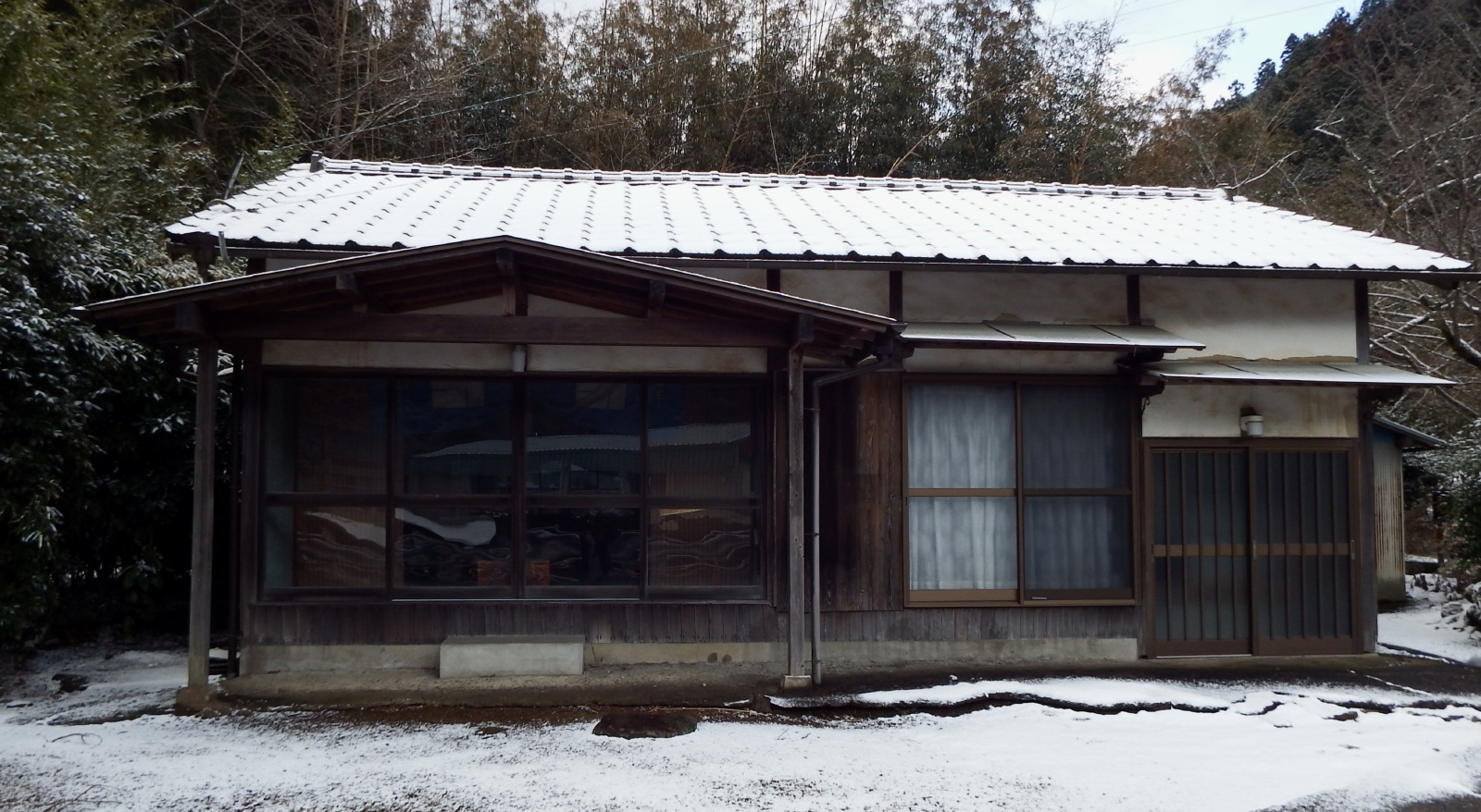 大窪寺への途中にある一夜庵